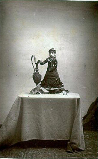 Conocida foto de Lucía Zarate